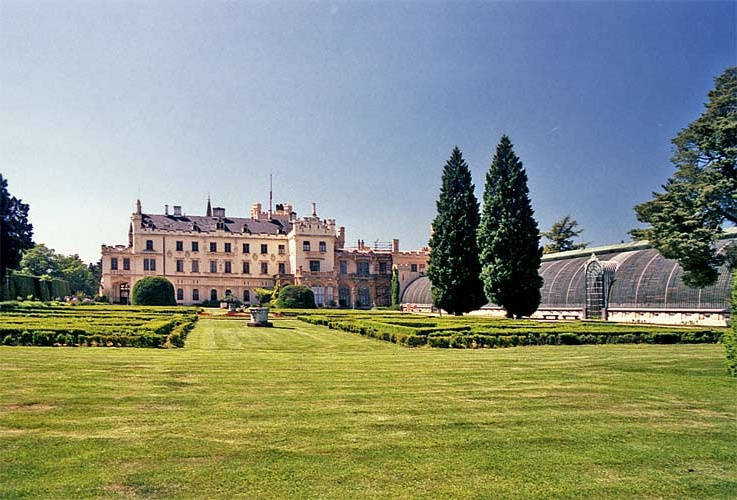 Palmový skleník u zámku Lednice